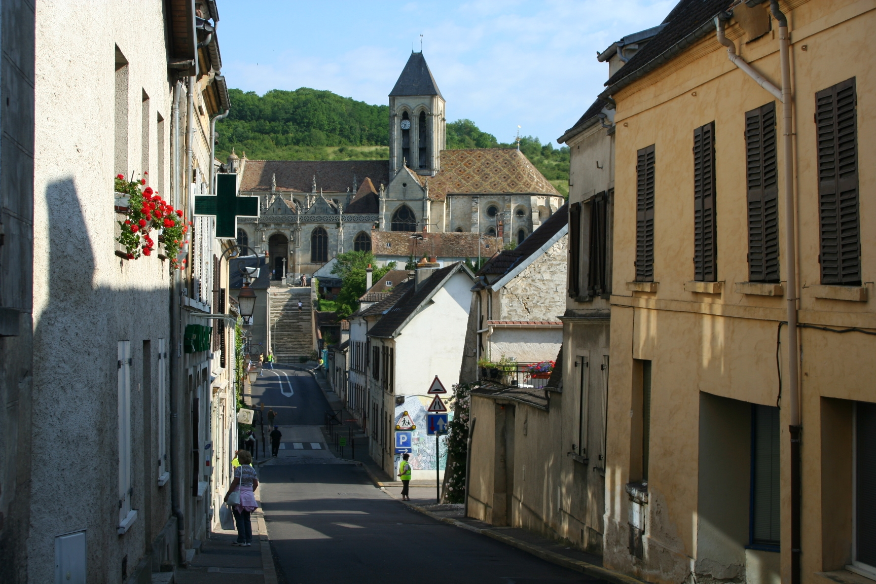 La rue de l'église à Vétheuil, Val-d'Oise, France